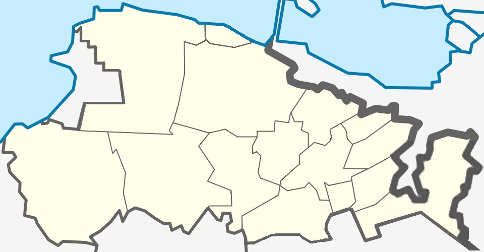 Карта Ломоносовского района Ленинградской области с делением на муниципальные образования.